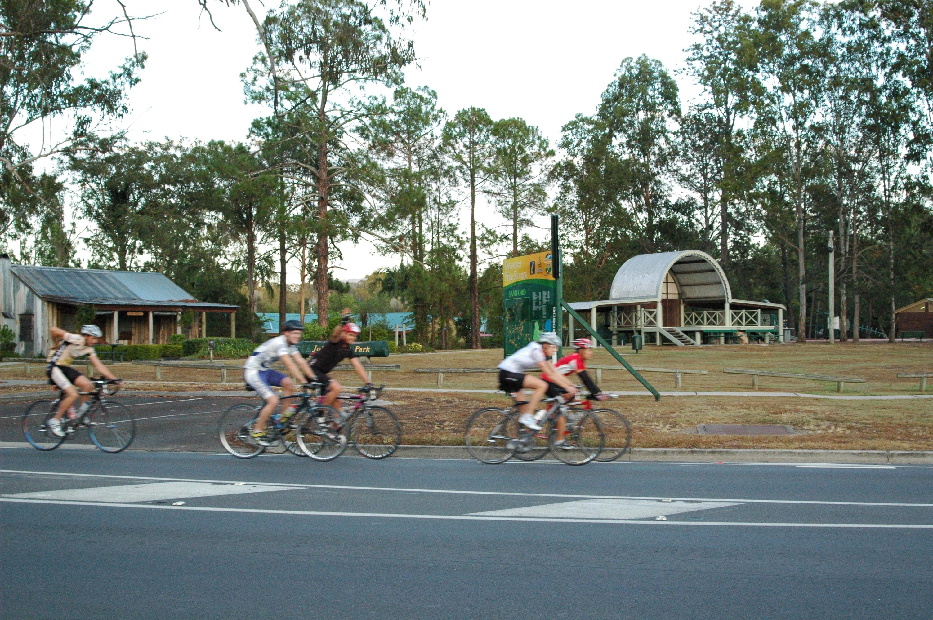 Alan McKernan. Nikon D70.